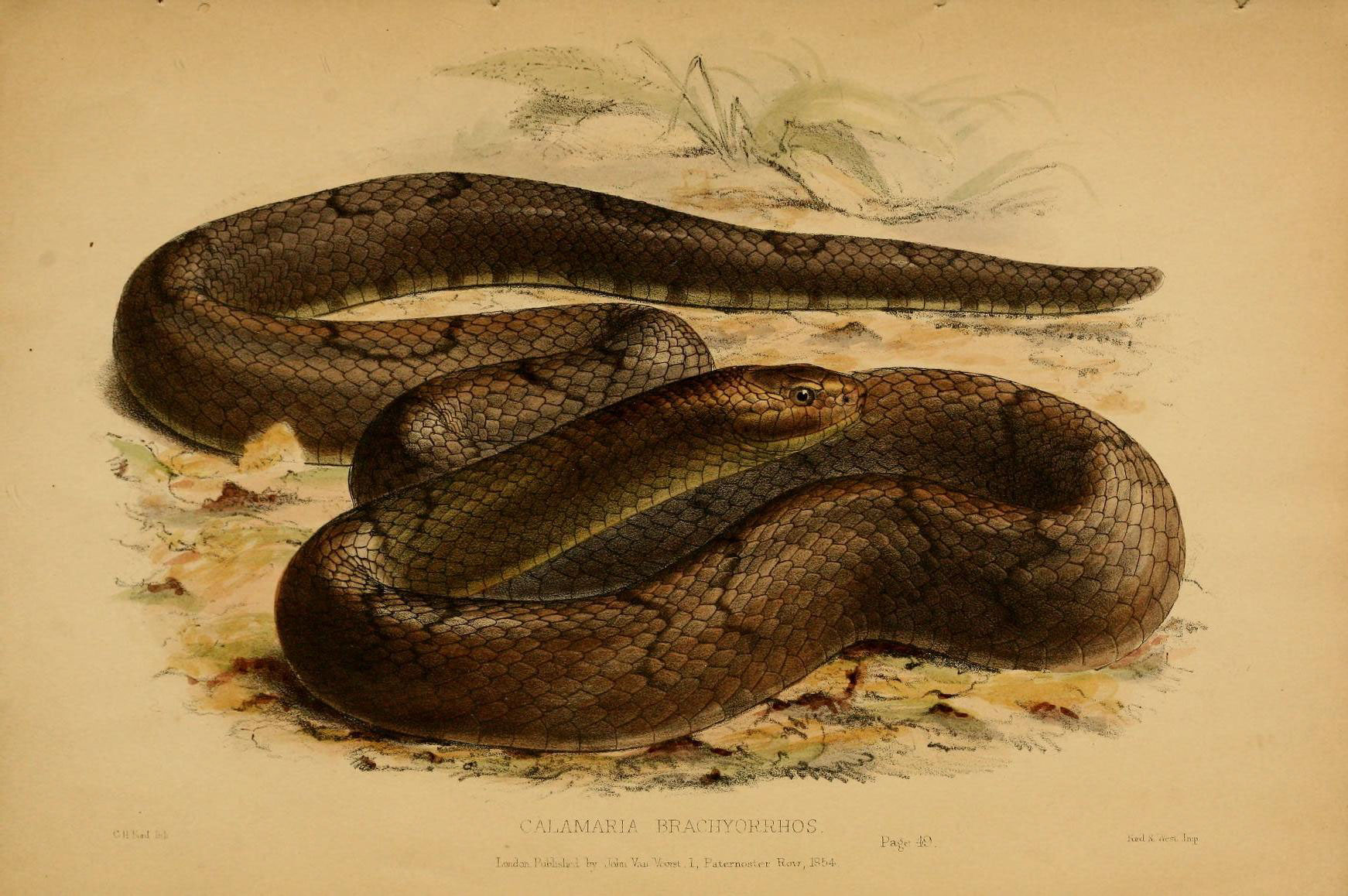 Calamaria brachyorphos =